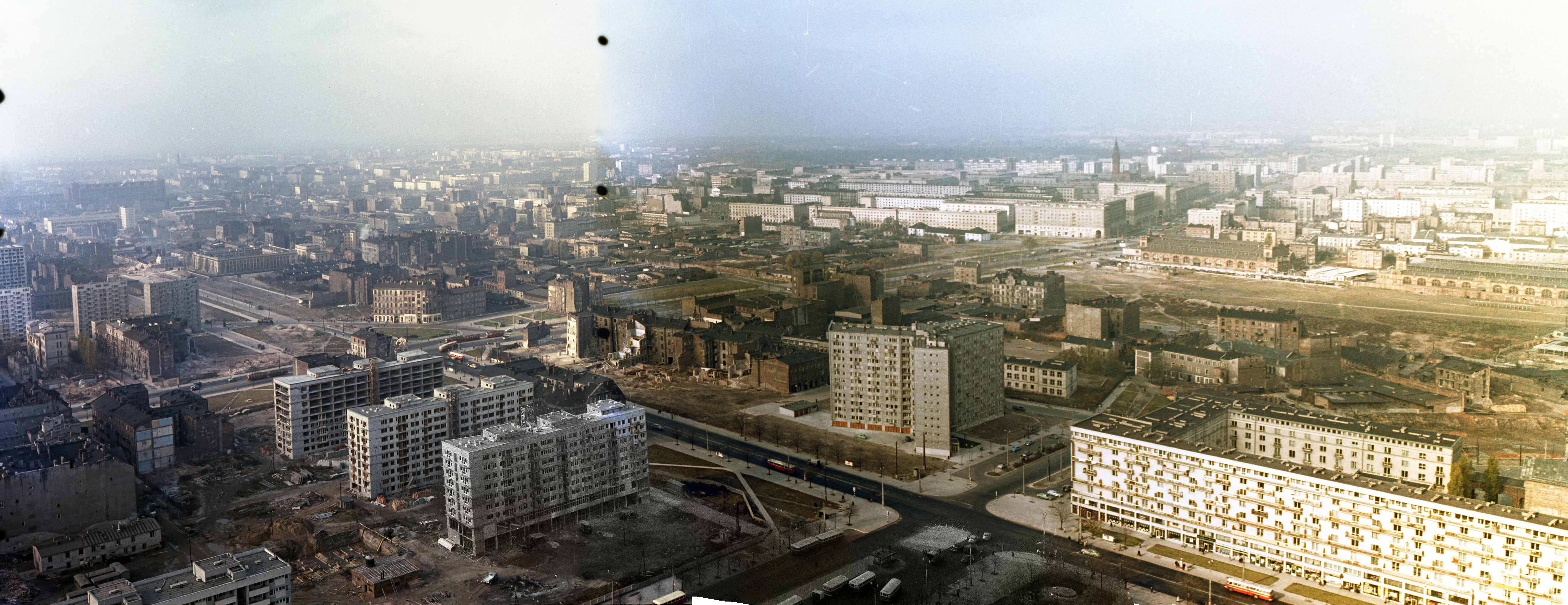 látkép a Kultúra és Tudomány Palotájából északnyugat felé, az előtérben az ulica Emilii Plater - ulica Swietokrzyska kereszteződés. Location: Poland, Warsaw Tags: colorful, picture Title: látkép a Kultúra és Tudomány Palotájából északnyugat felé, az előtérben az ulica Emilii Plater - ulica Swietokrzyska kereszteződés.